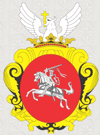 Герб Тернавиотов